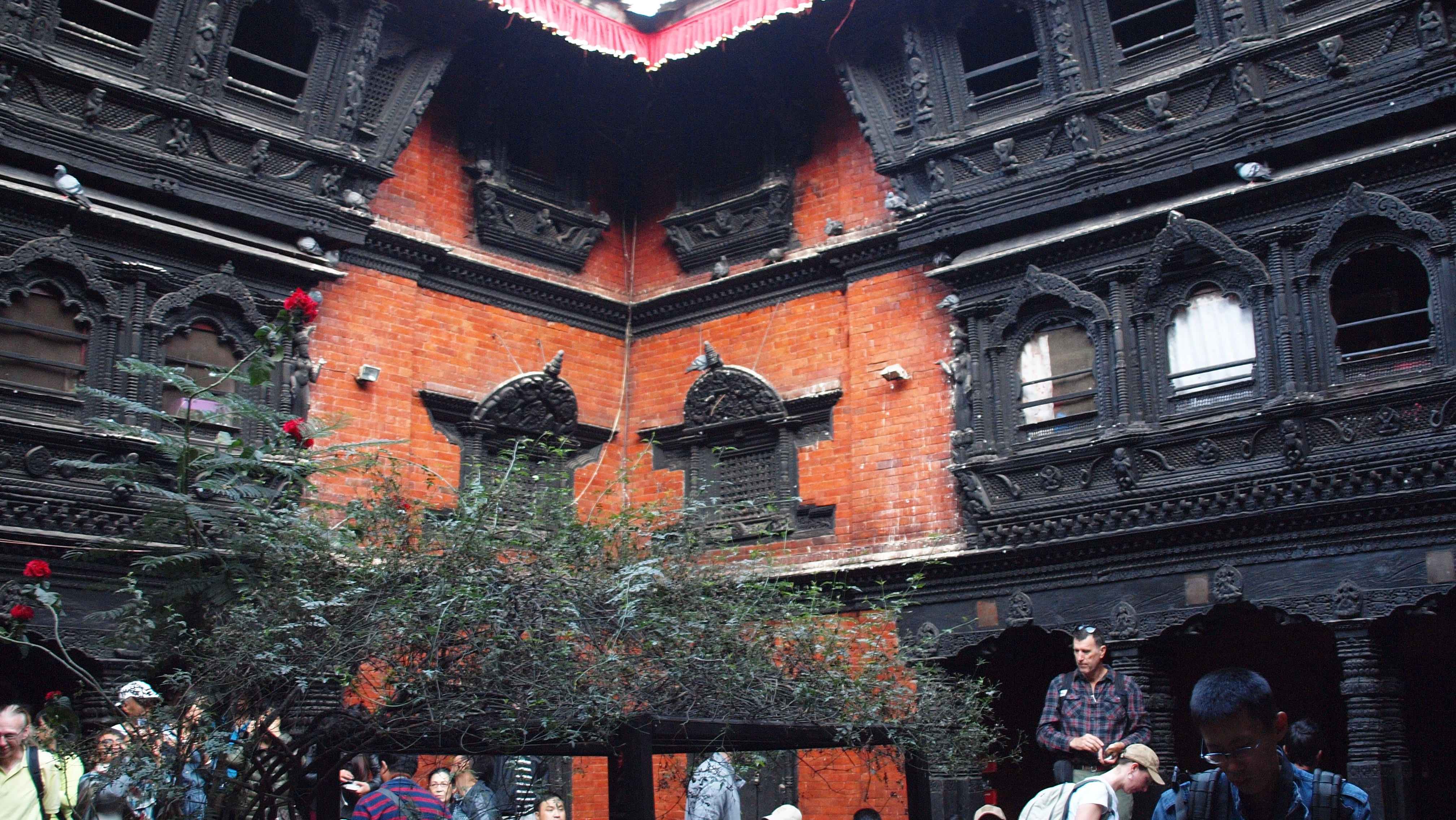 Nepal, Kathmandu, Durbar-Platz, Tempel-Palast der Kumari 2013